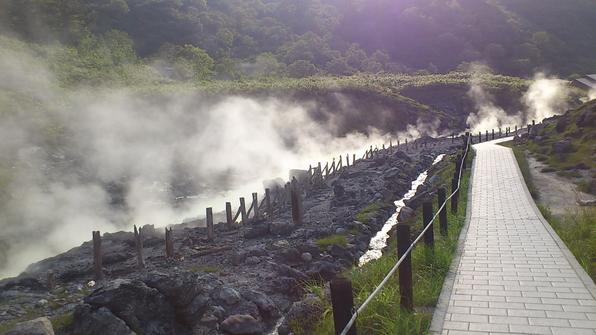 玉川温泉の源泉。湯の花の採取も行われている。